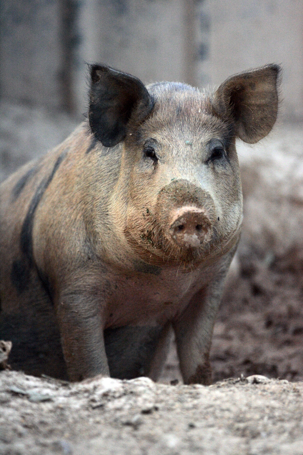 Pig